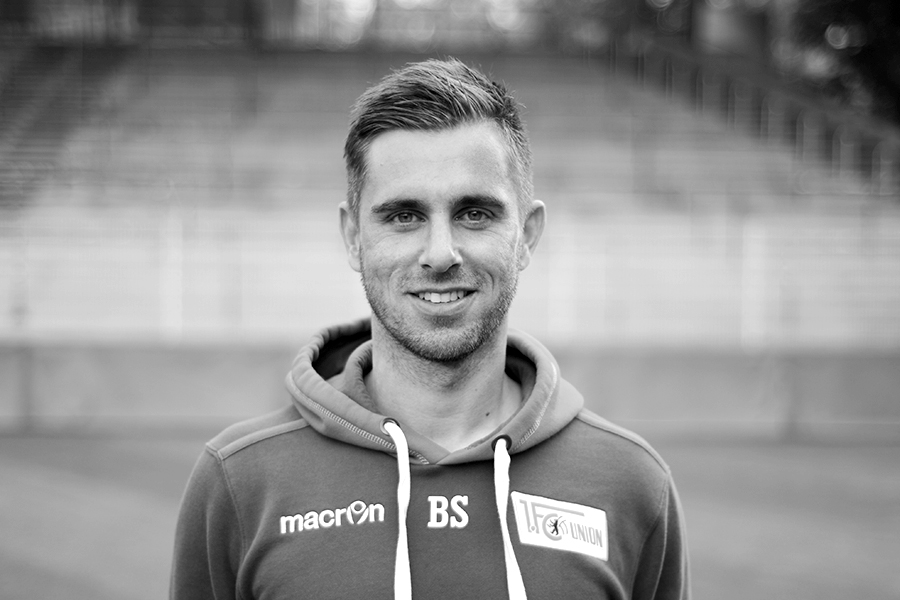 Mannschaftsfoto 2015/16